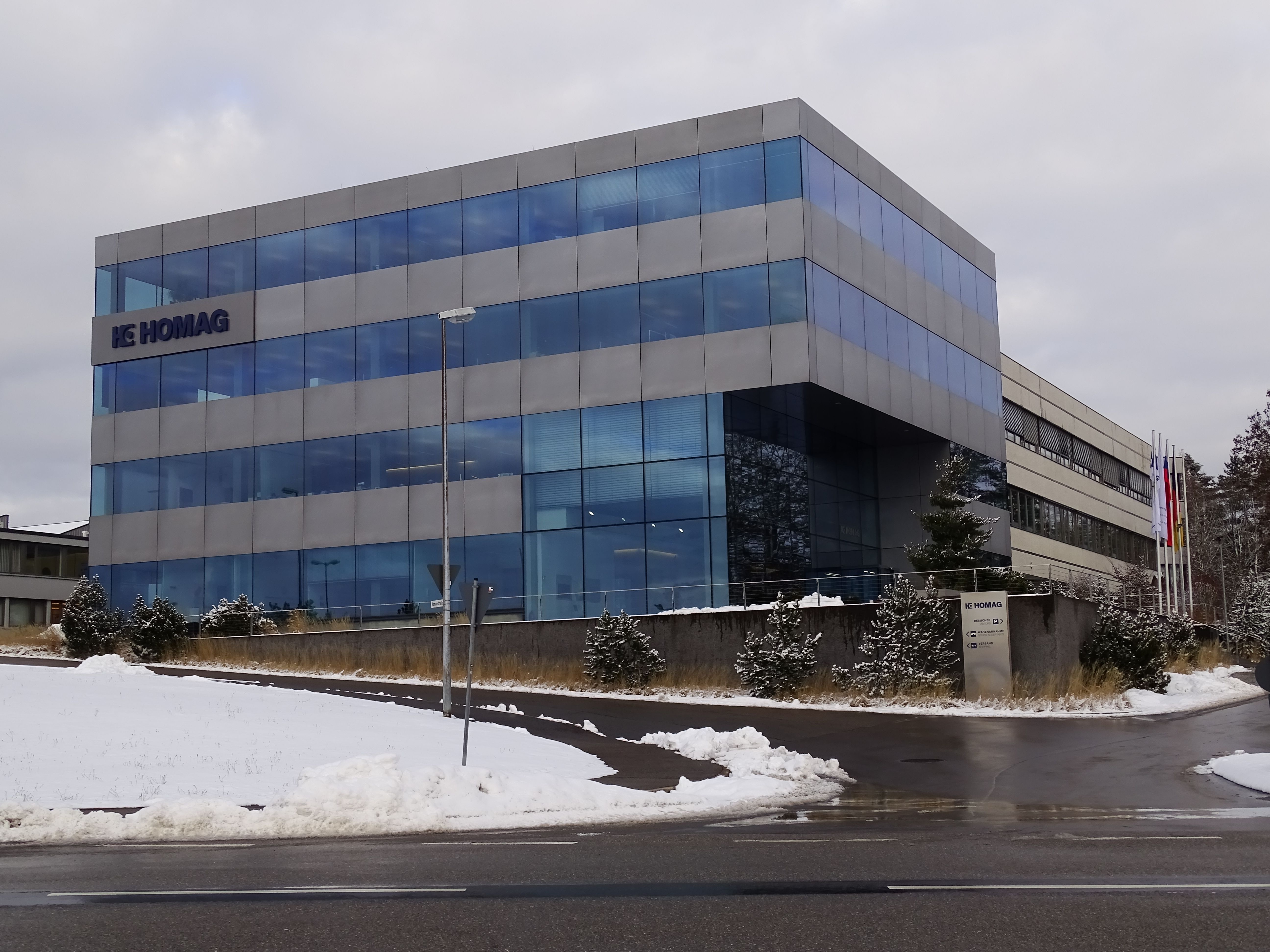 Firmensitz der Homag Gruppe in Schopfloch